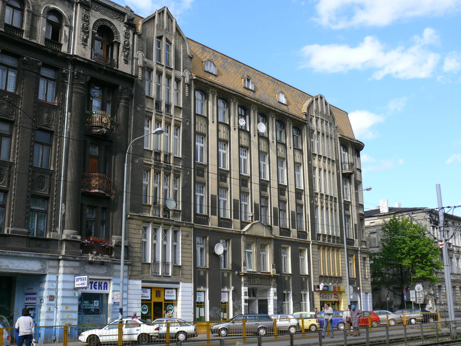 dom mieszkalny przy ul. Narutowicza 44 w Łodzi